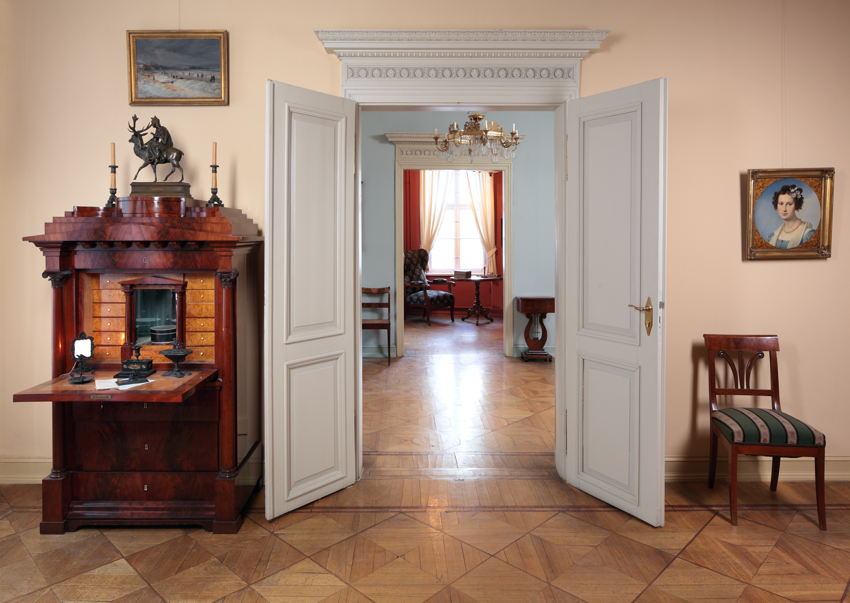 Foto: Michael Setzpfandt